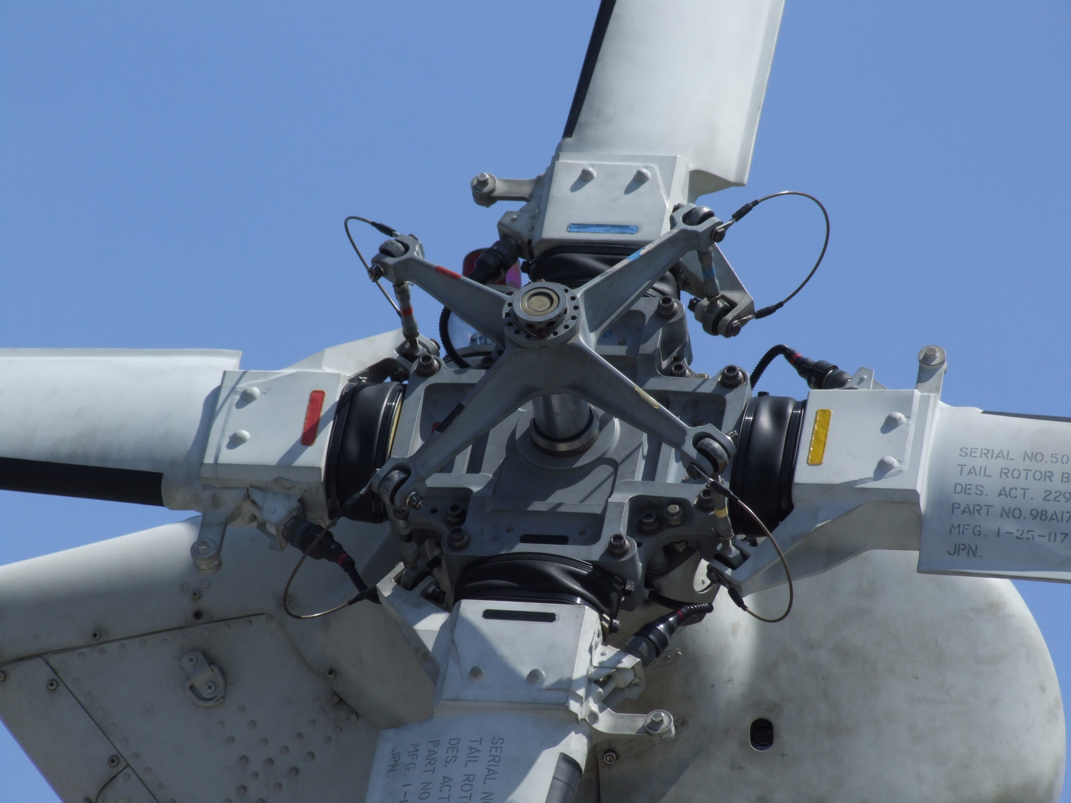 SH-60Kのテールローターの中心部分